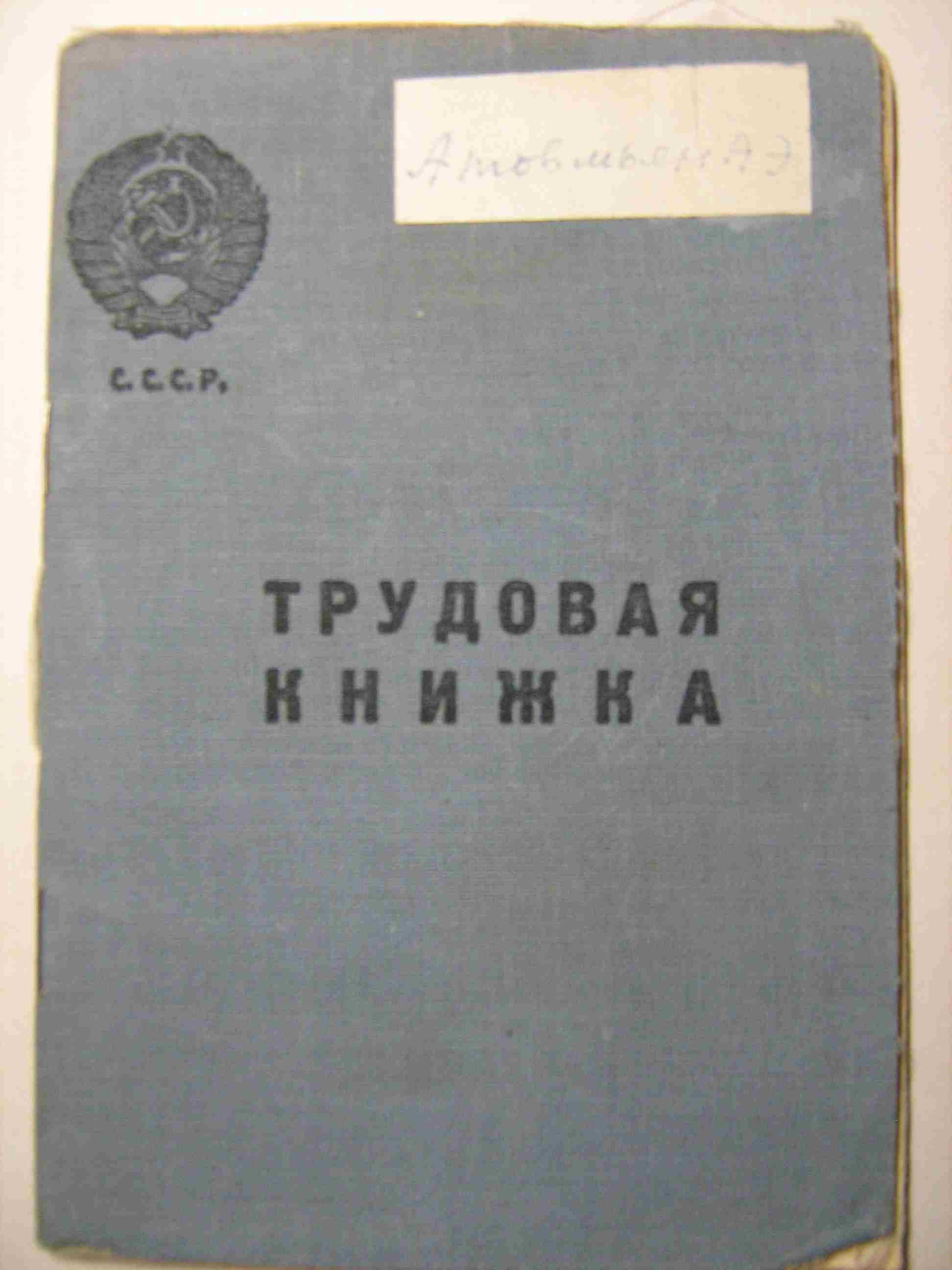 Трудовая_книжка_39